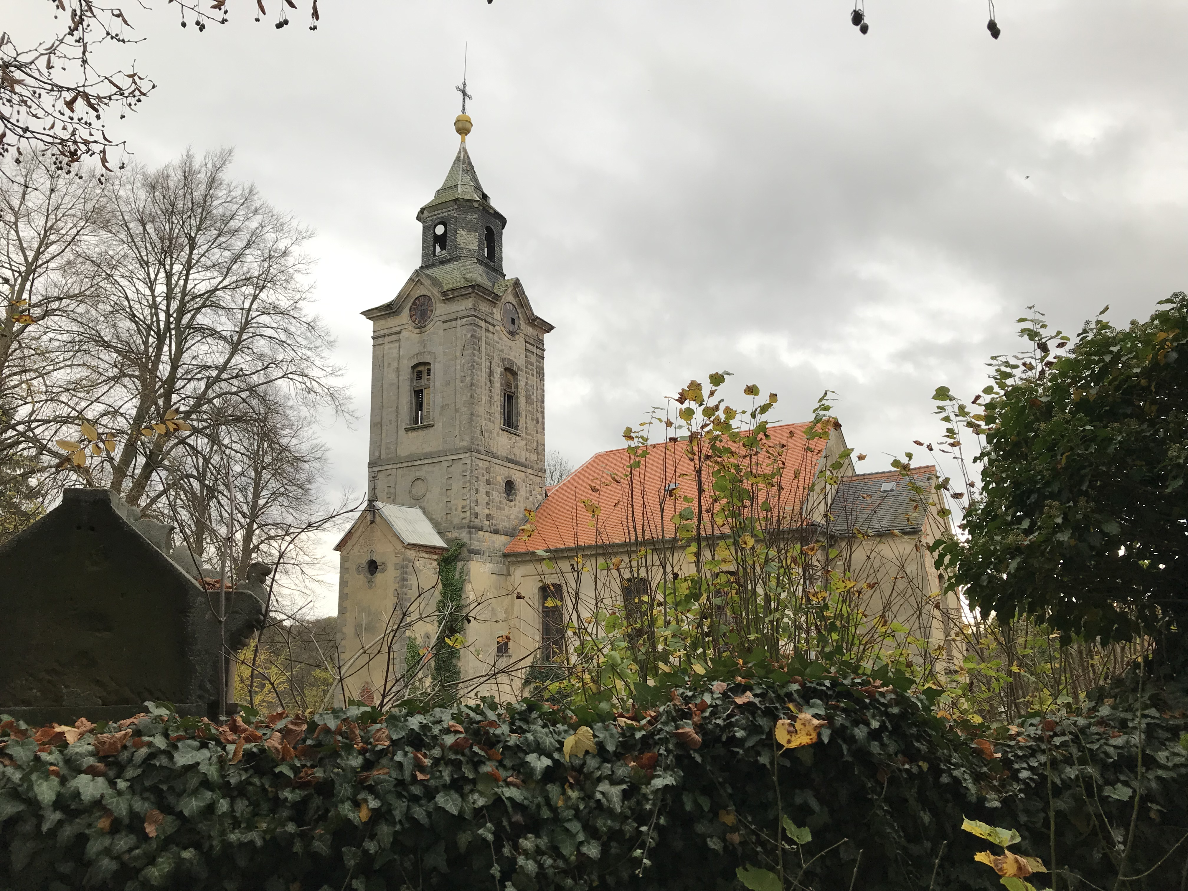 Kostel v Lindavě z boku v roce 2019